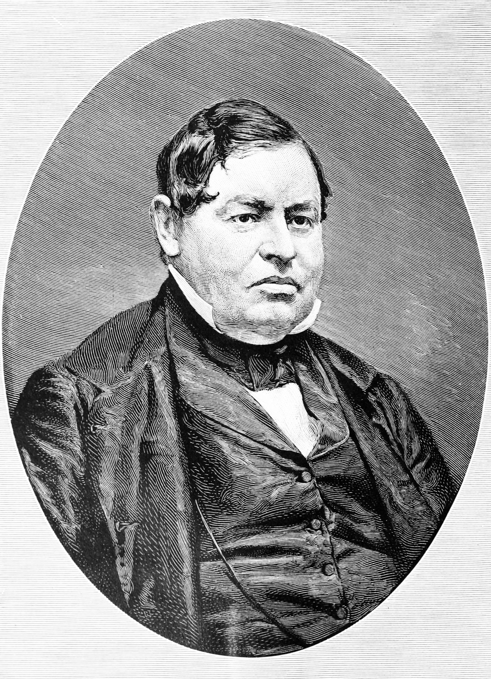 Sears Cook Walker